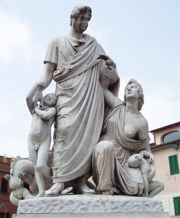 Il Monumento a Canapone in Piazza Dante a Grosseto, Tuscany (Italy)